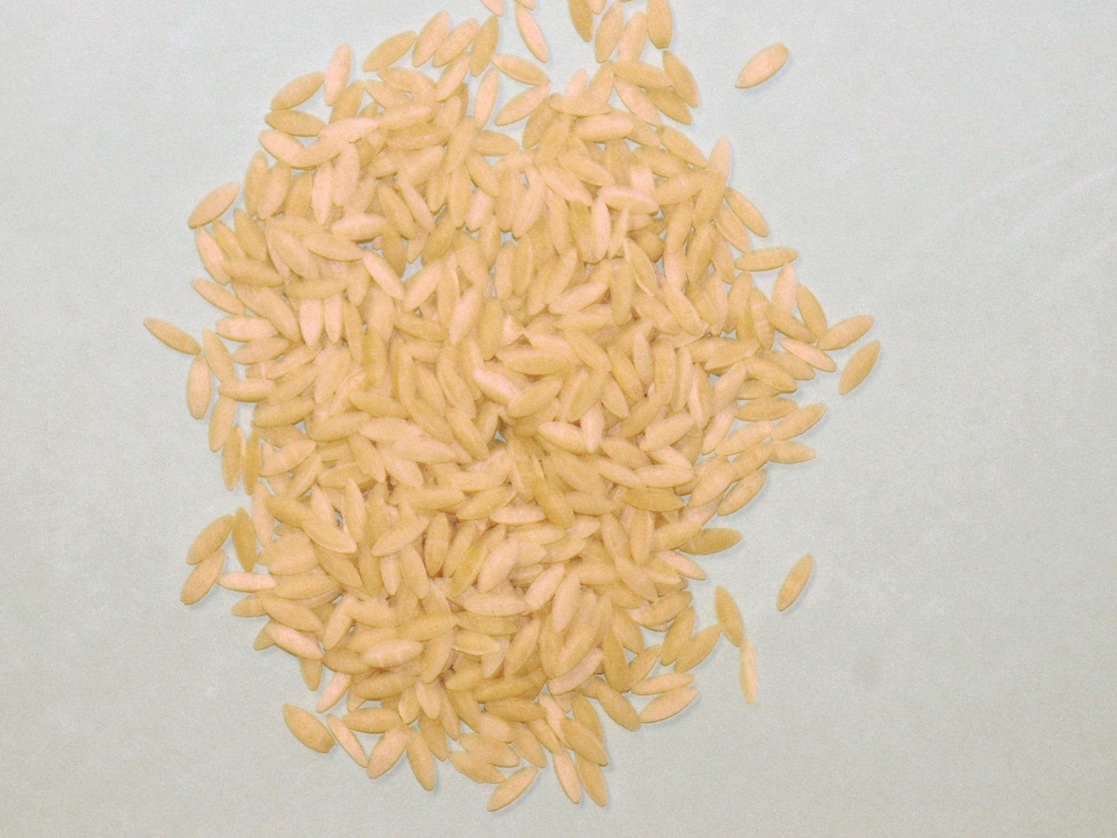 Orzo pasta.